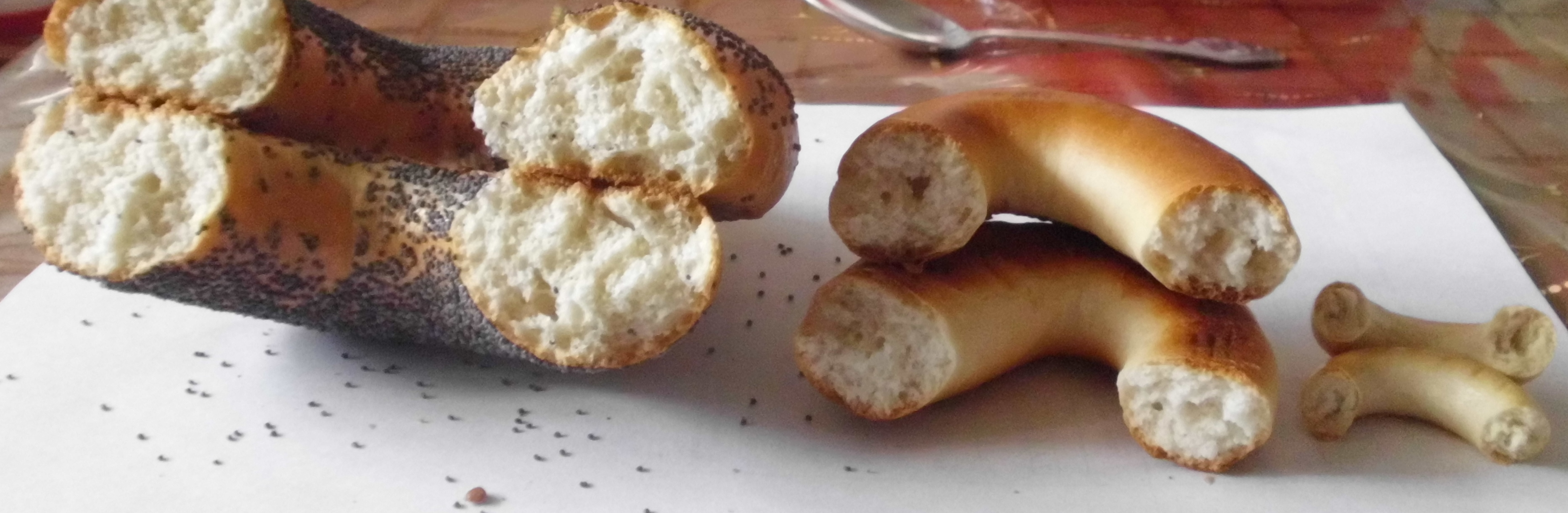 Бараночные изделия на изломе (слева-направо): Бублик, Баранка, Сушка. Для сравнения размера - стандартная чайная ложка.